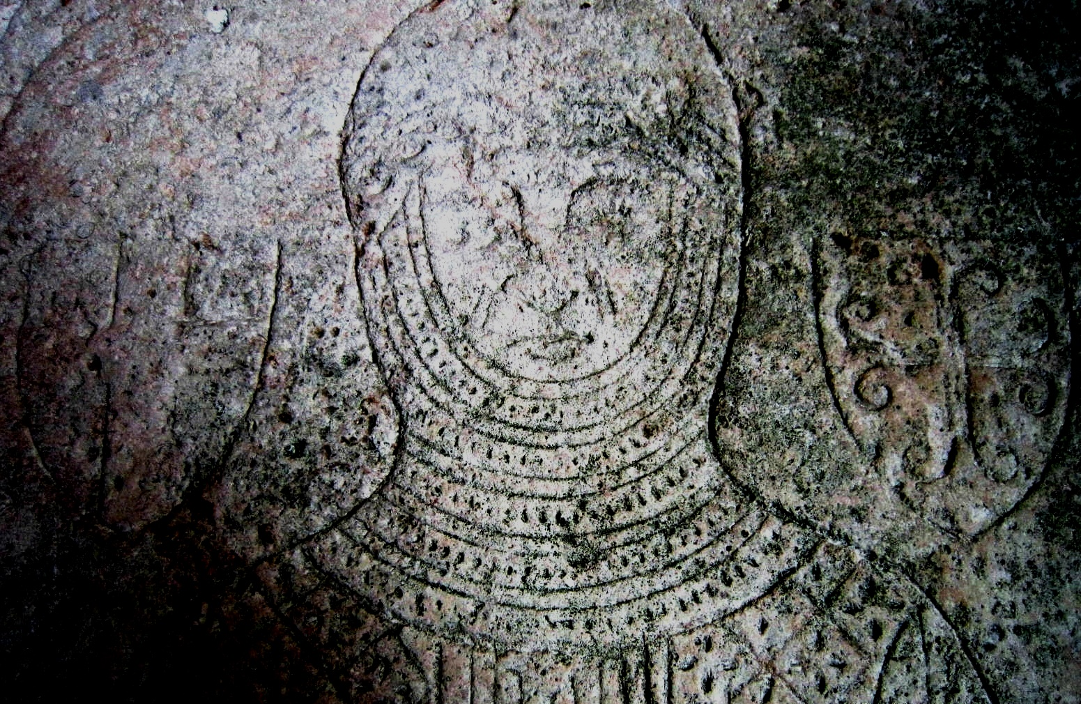 Pierre tombale (détail) de Guillaume de Fougerolles Bure-les-Templiers (Côte-d'Or)